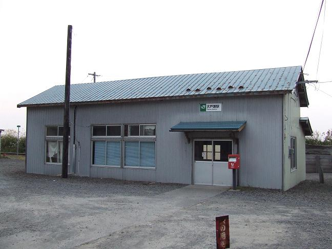 JR大戸瀬駅駅舎